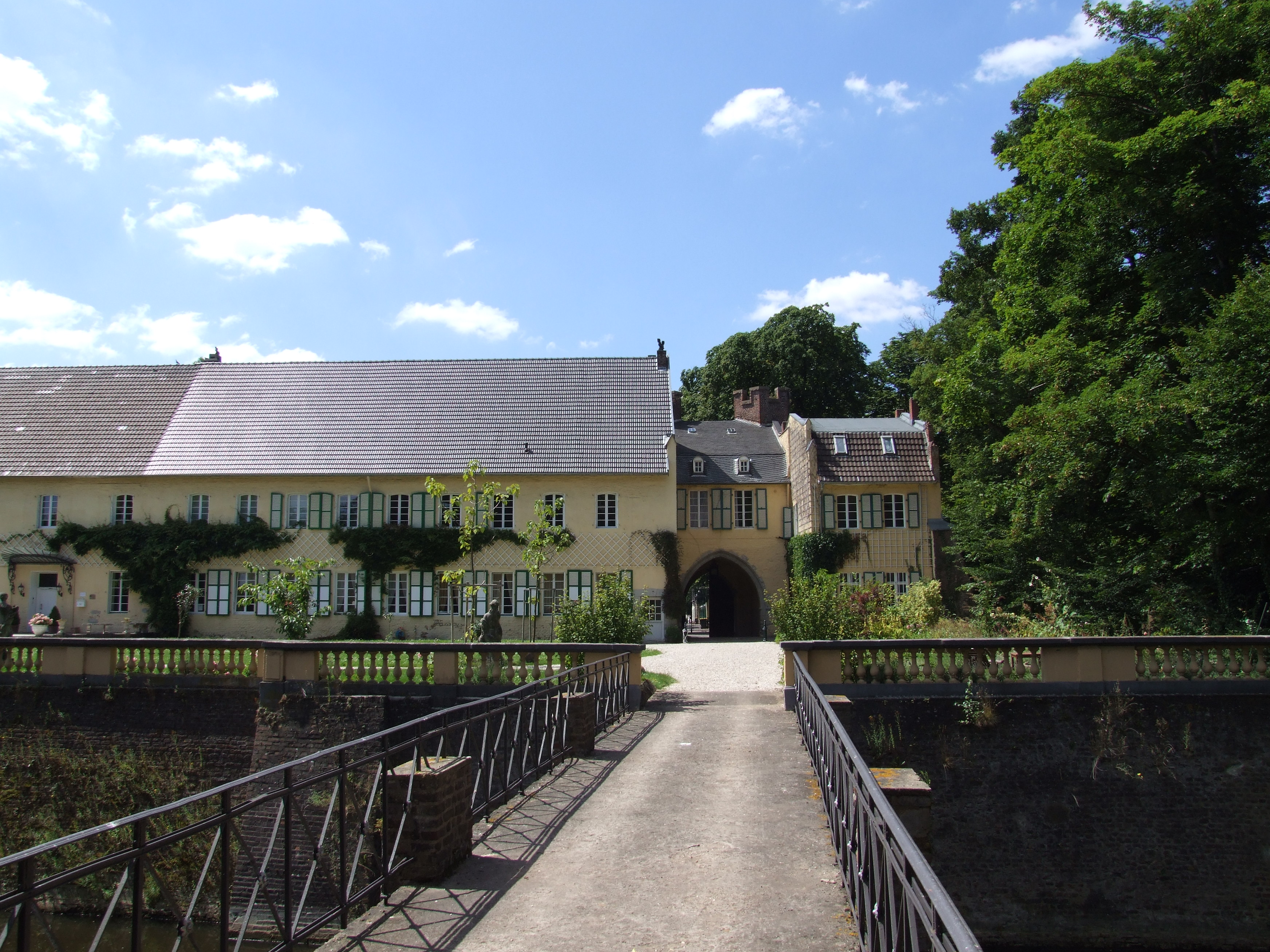 Schloss Lechenich